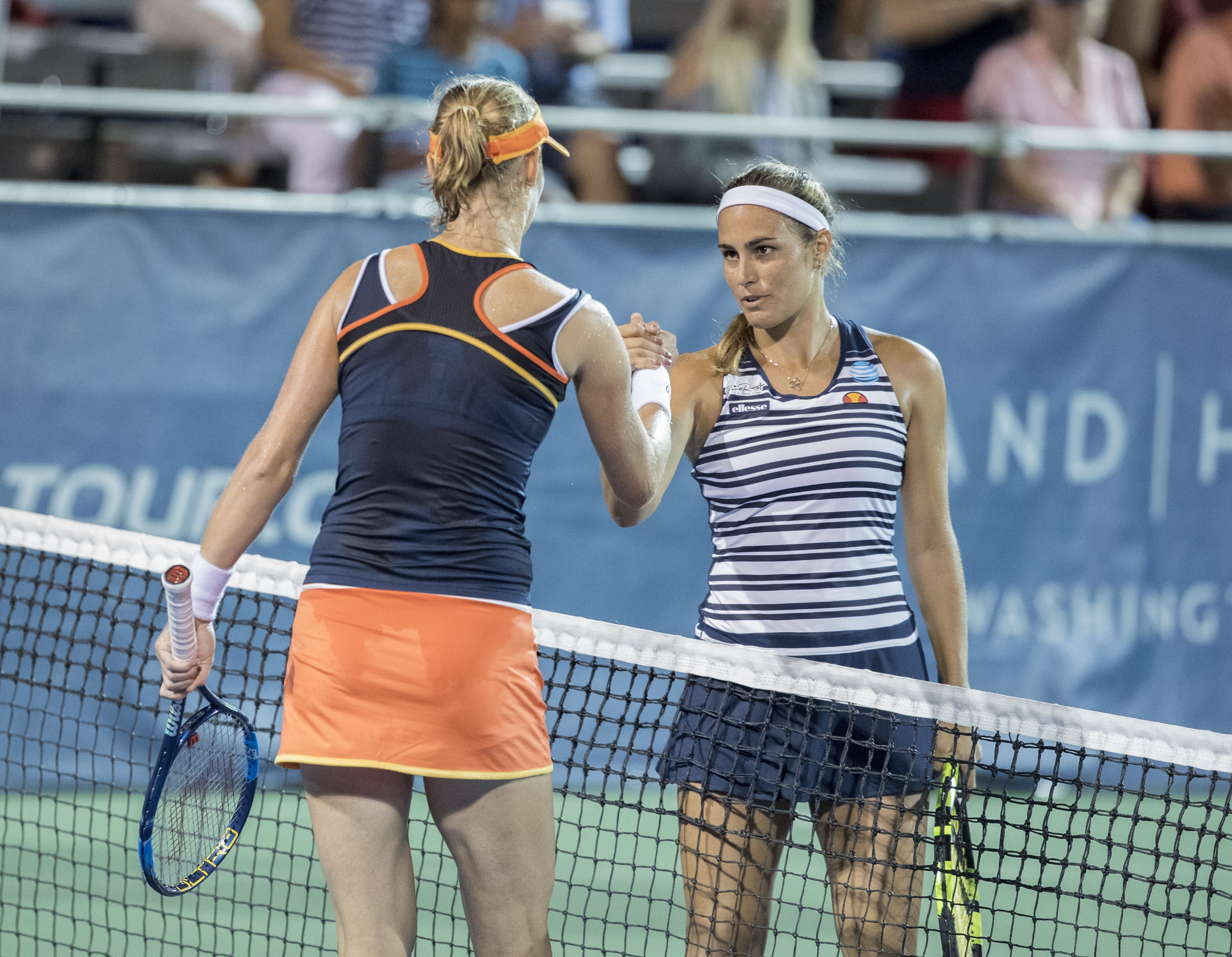 Citi Open Tennis 2017